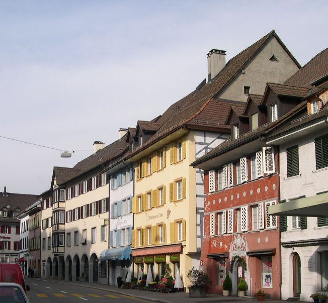 Nördliche Häuserzeile der Schwertgasse in Zurzach.